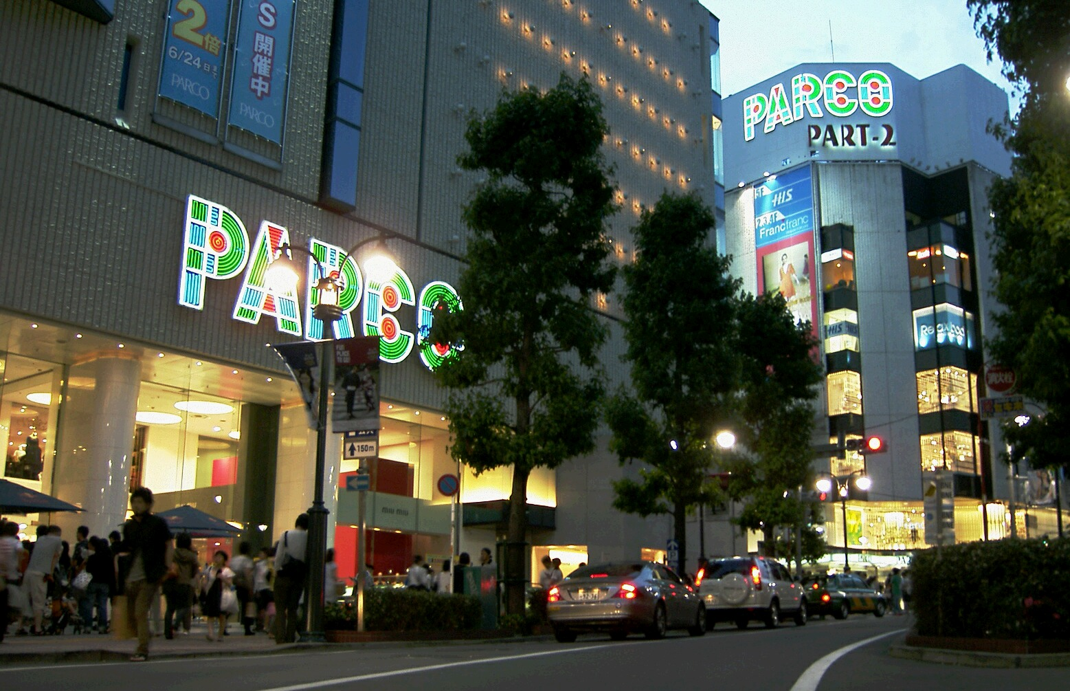 PARCO_Shibuya_Part1-2